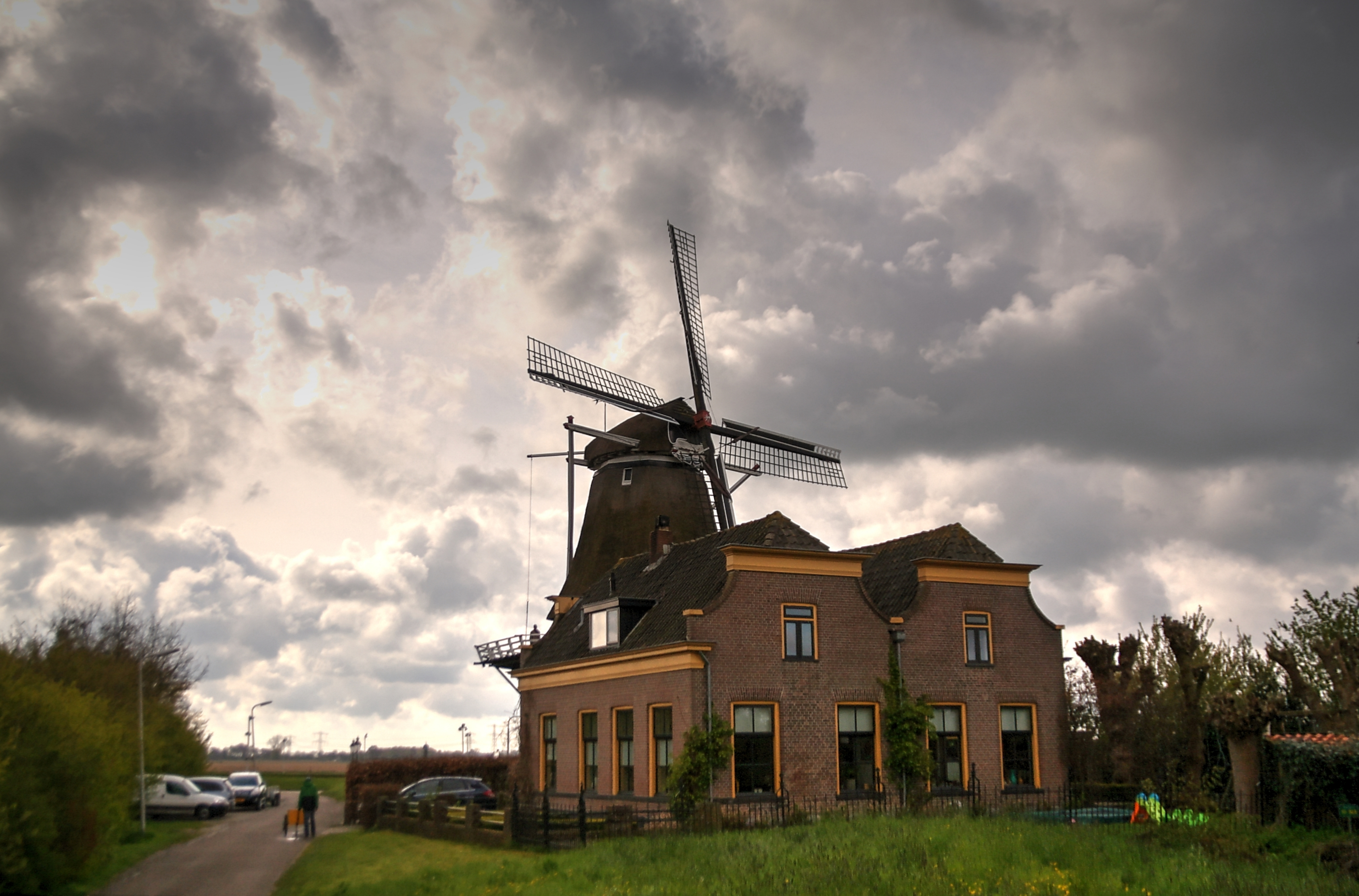 De molen met molenaarswoning